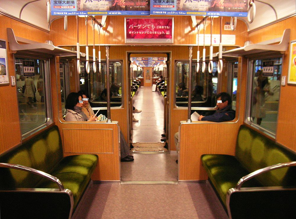 三宮駅停車中の阪急5000系リニューアル車の車内運転台撤去跡（簡易）。